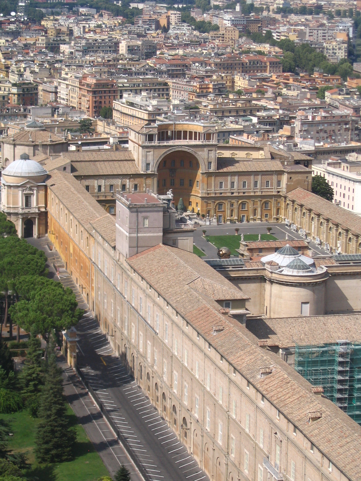 Musei Vaticani